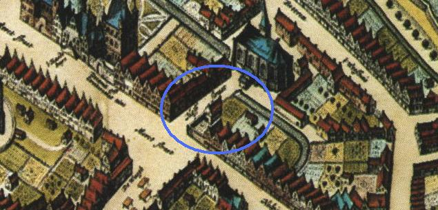 Uitsnede van het Sikkingahuis